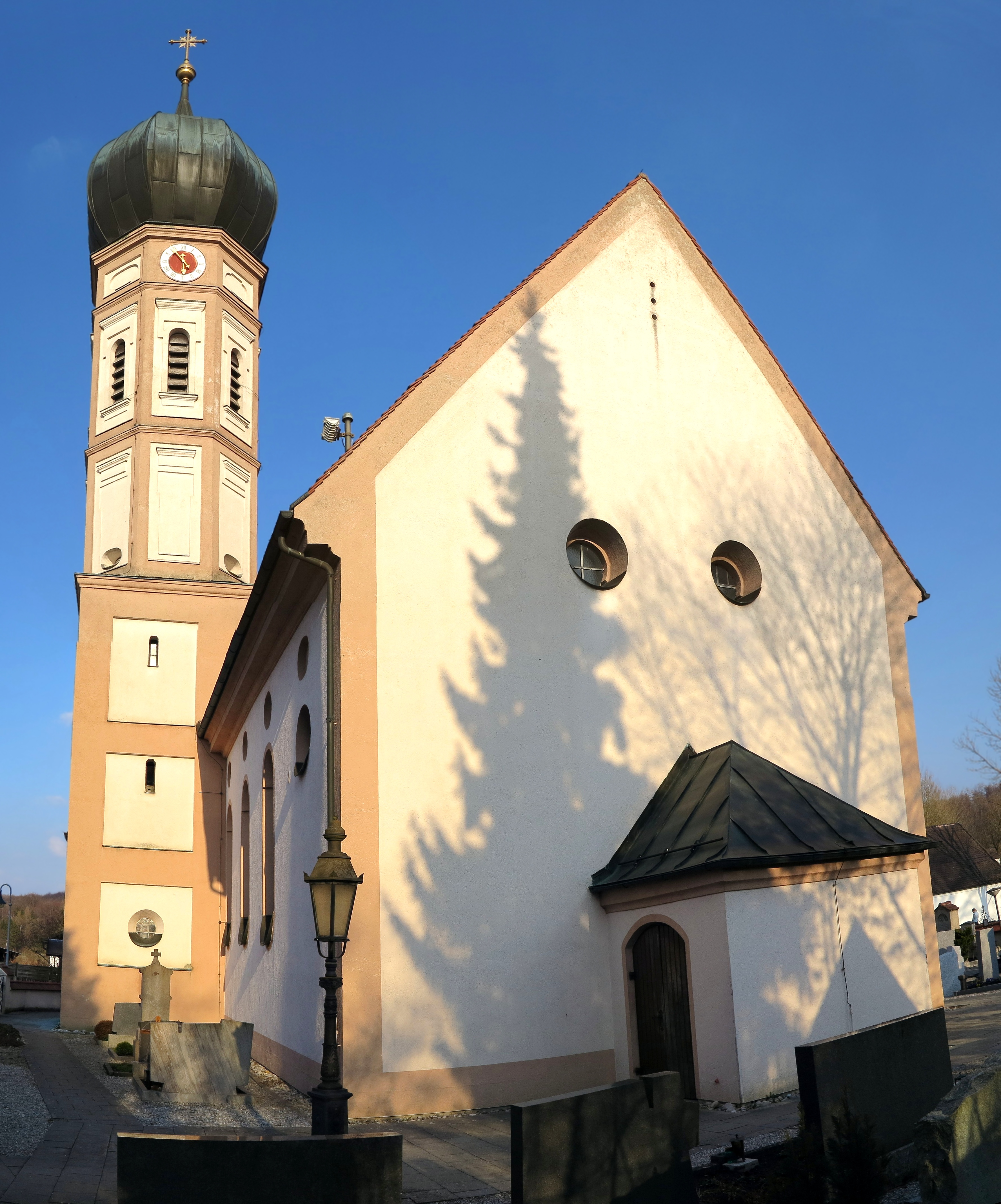 Deutschland, Bayern, Landkreis Fürstenfeldbruck, Schöngeising, katholische Kirche St. Johannes Baptist, barocker Saalbau von 1683 mit Zwiebelhaube auf dem Nordturm